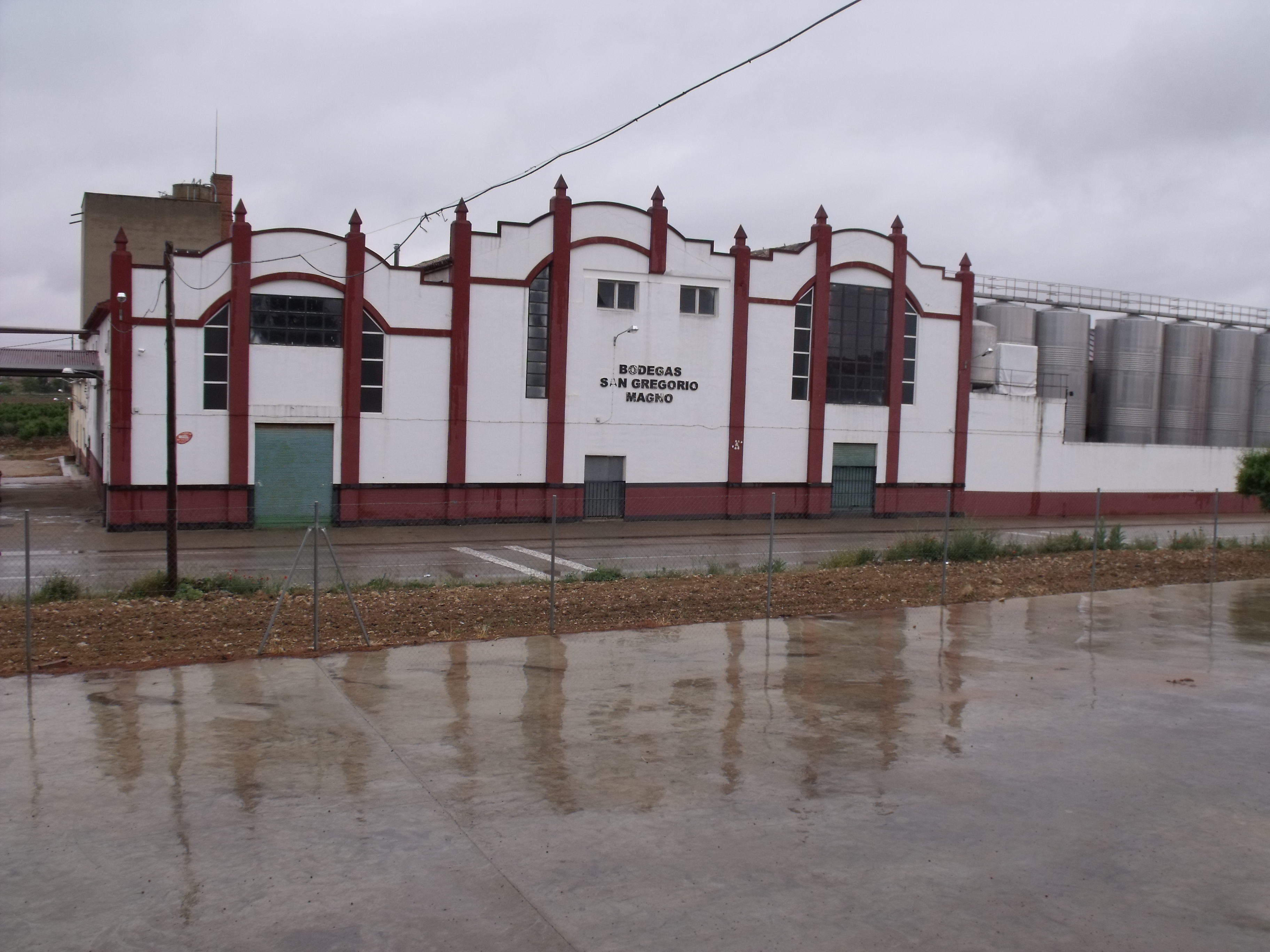 Instalaciones de las bodegas San Gregorio